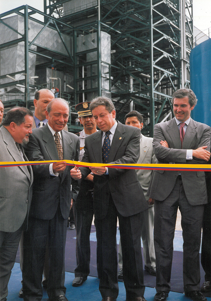 Corte de cinta de una central en Guayaquil. (Ecuador).